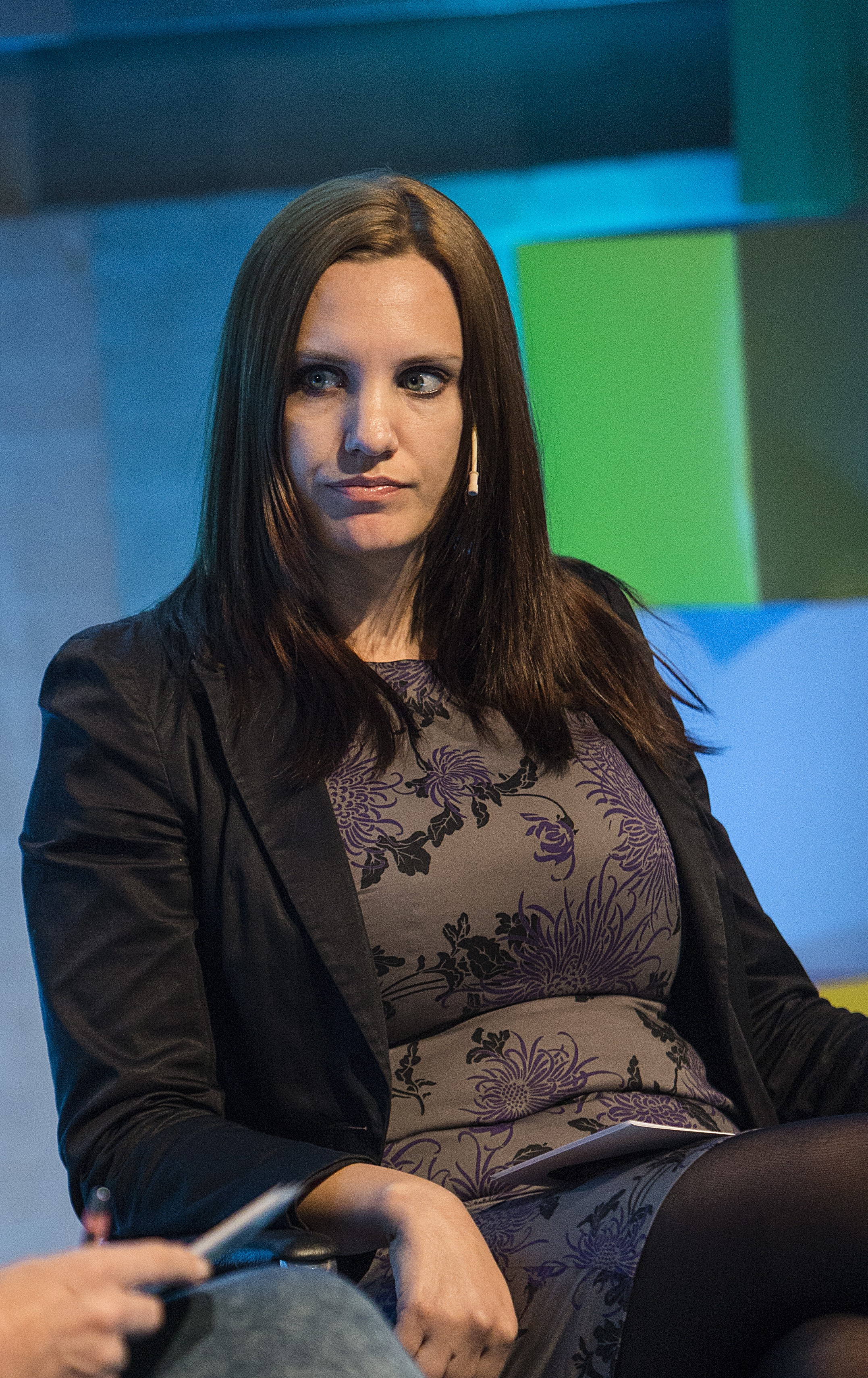 Kristin Solberg. Foto: Jarle H. Moe /Nordiske Mediedager